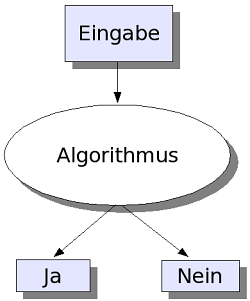 Grafische Veranschaulichung eines Entscheidungsproblems Urheber: Matthias Kleine, Februar 2005